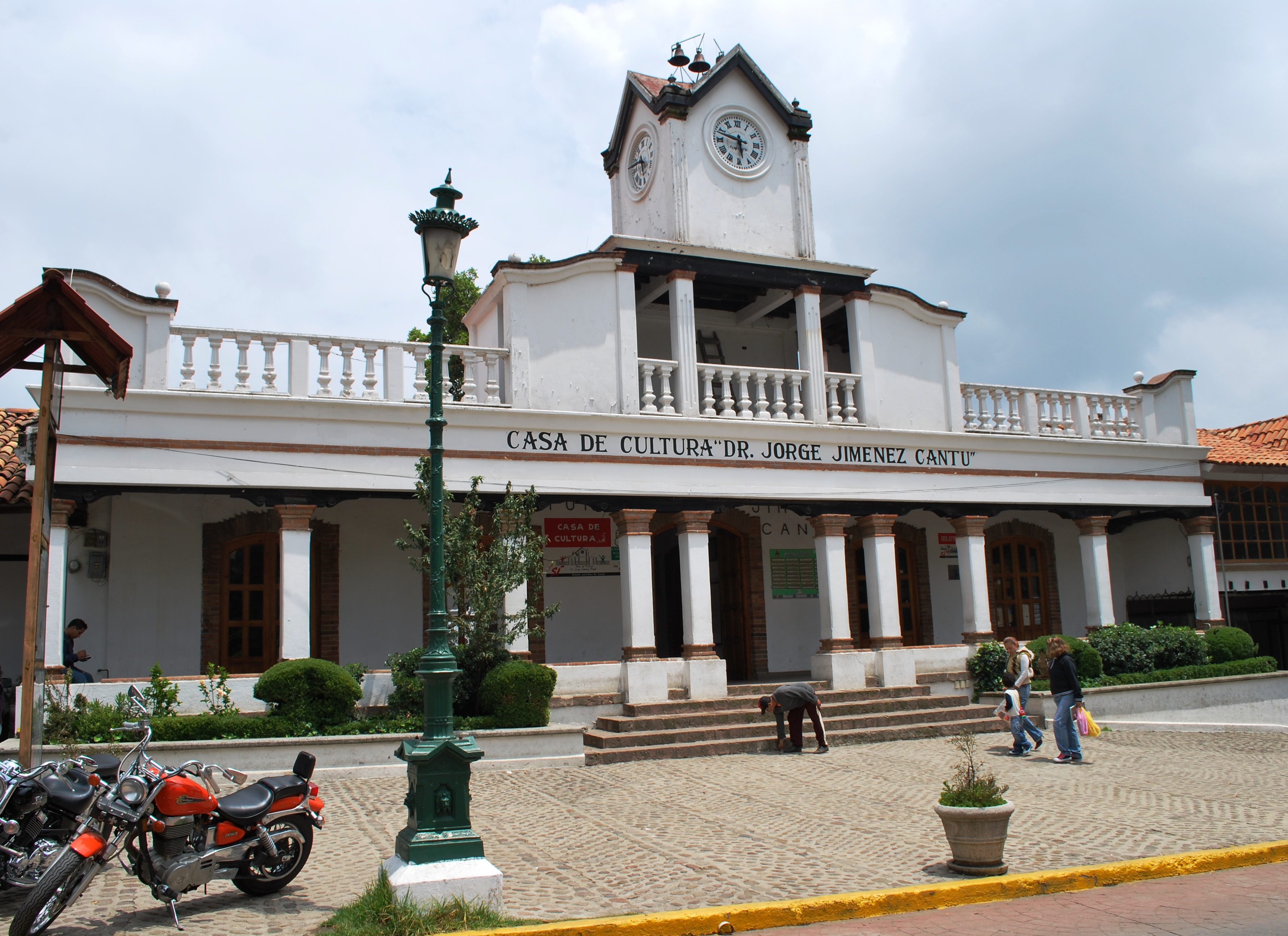 Casa de Cultura Dr Jorge Jimenez Cantu in Villa del Carbón, Mexico State, Mexico